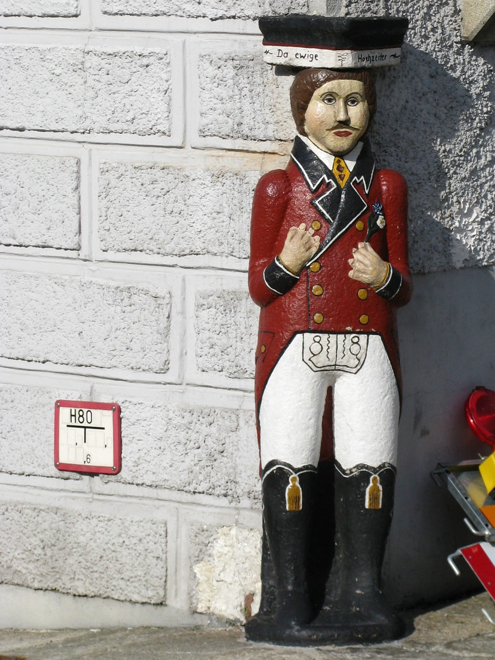 „Der ewige Hochzeiter“; Figur aus Granit am Marktplatz von Waldkirchen; Steinmetz Matthias Hausbäck hatte Mitte des 19. Jahrhunderts dem vorhandenen Radabweiserstein diese Form verliehen